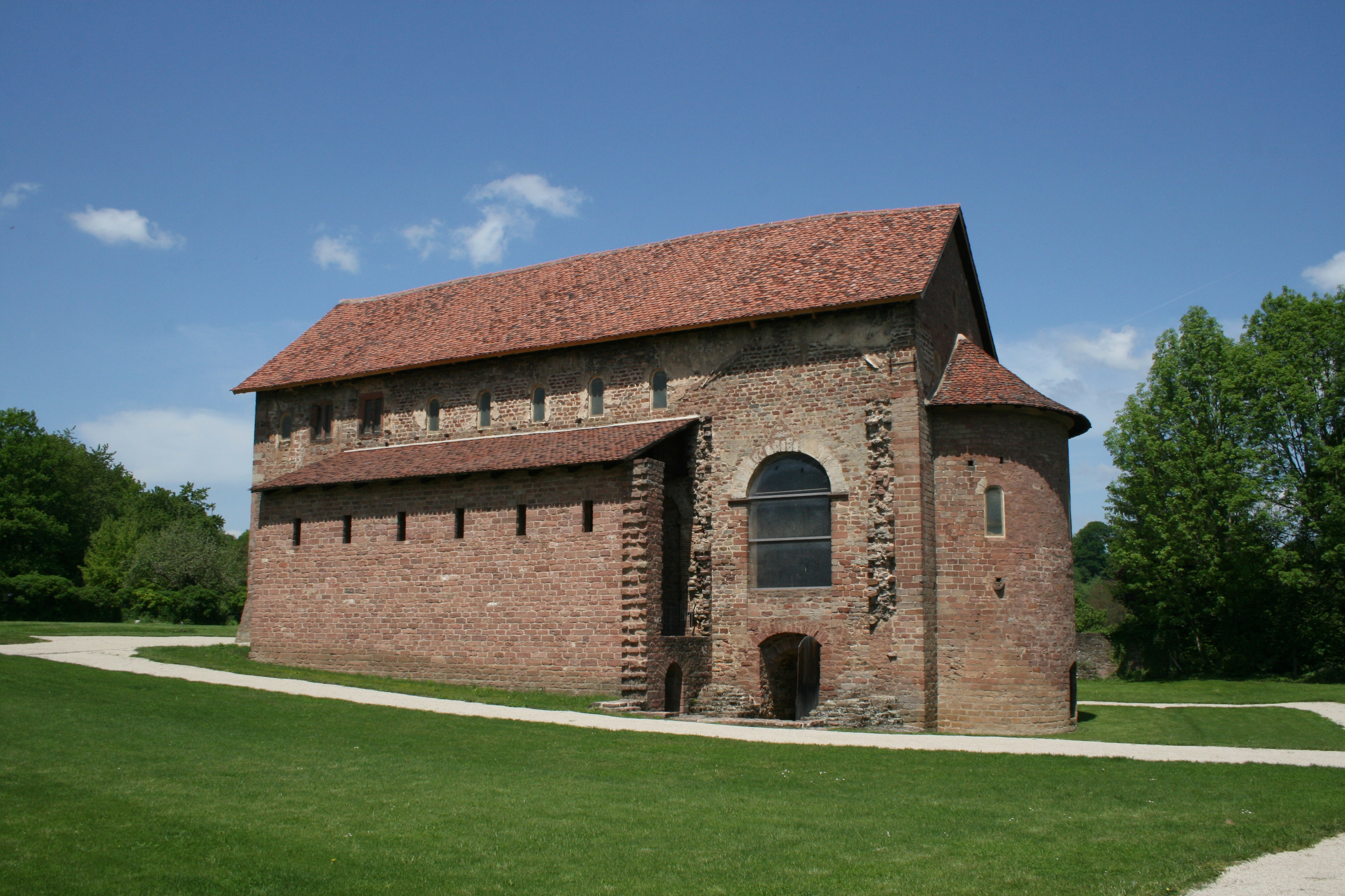 Einhardsbasilika in Michelstadt-Steinbach, Odenwald. Ansicht von Südosten 2012.